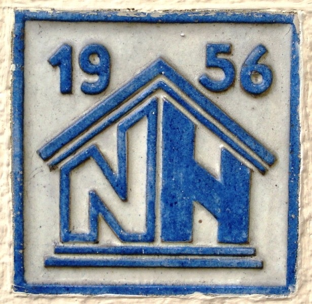 Nassauische_Heimstaette_-_Gebaeudeschild